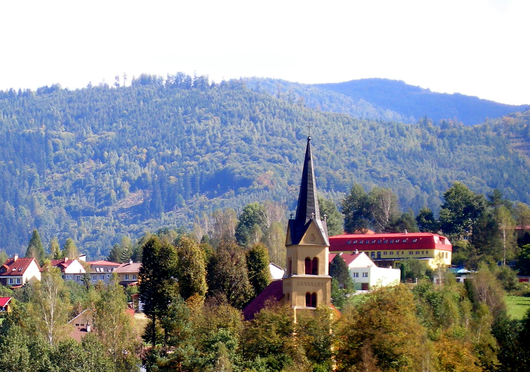 Spišská obec Prakovce. Okres Gelnica